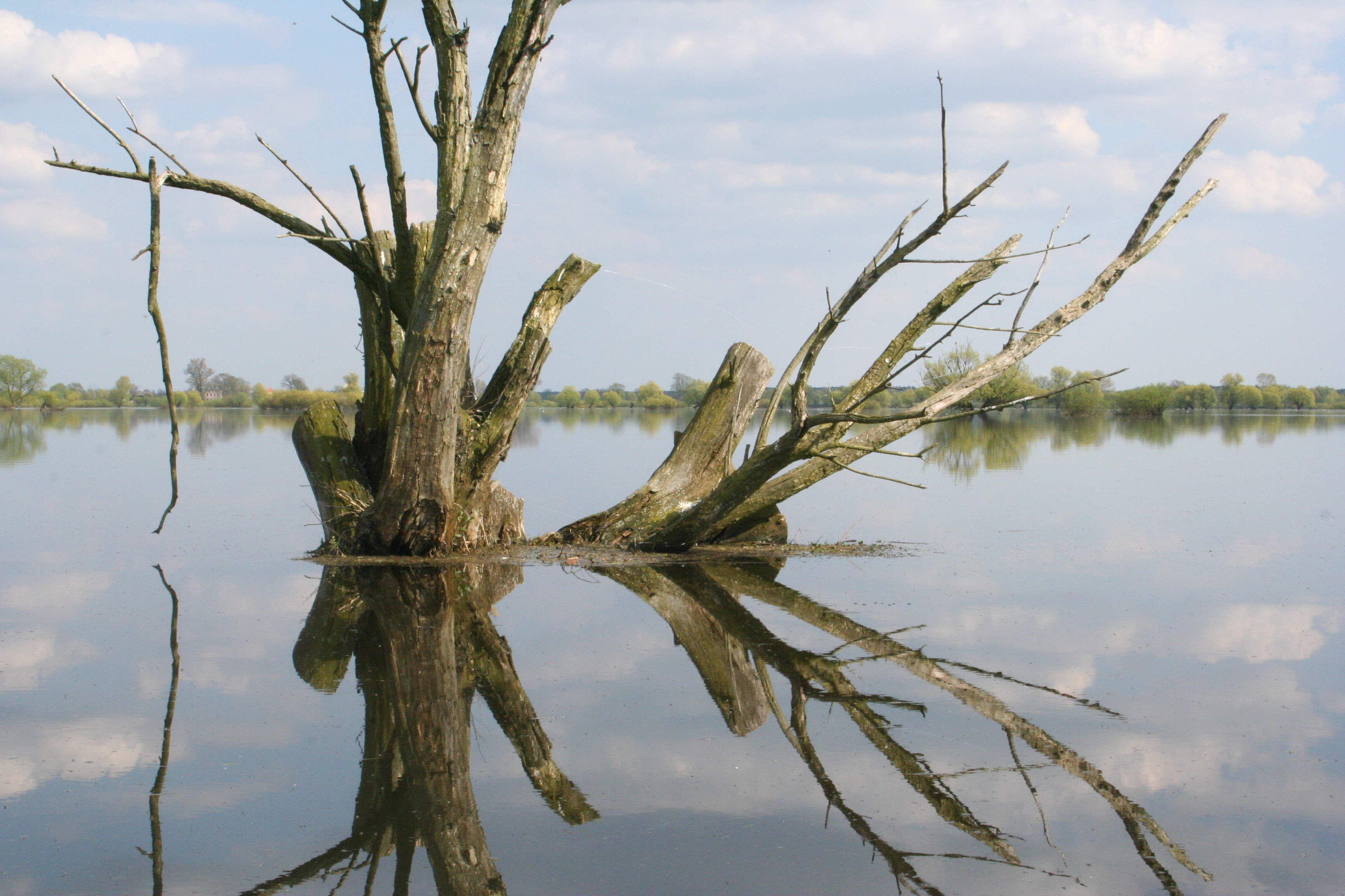 Nationalpark Warthemündung, abgestorbener Baum im überflutetem Gebiet